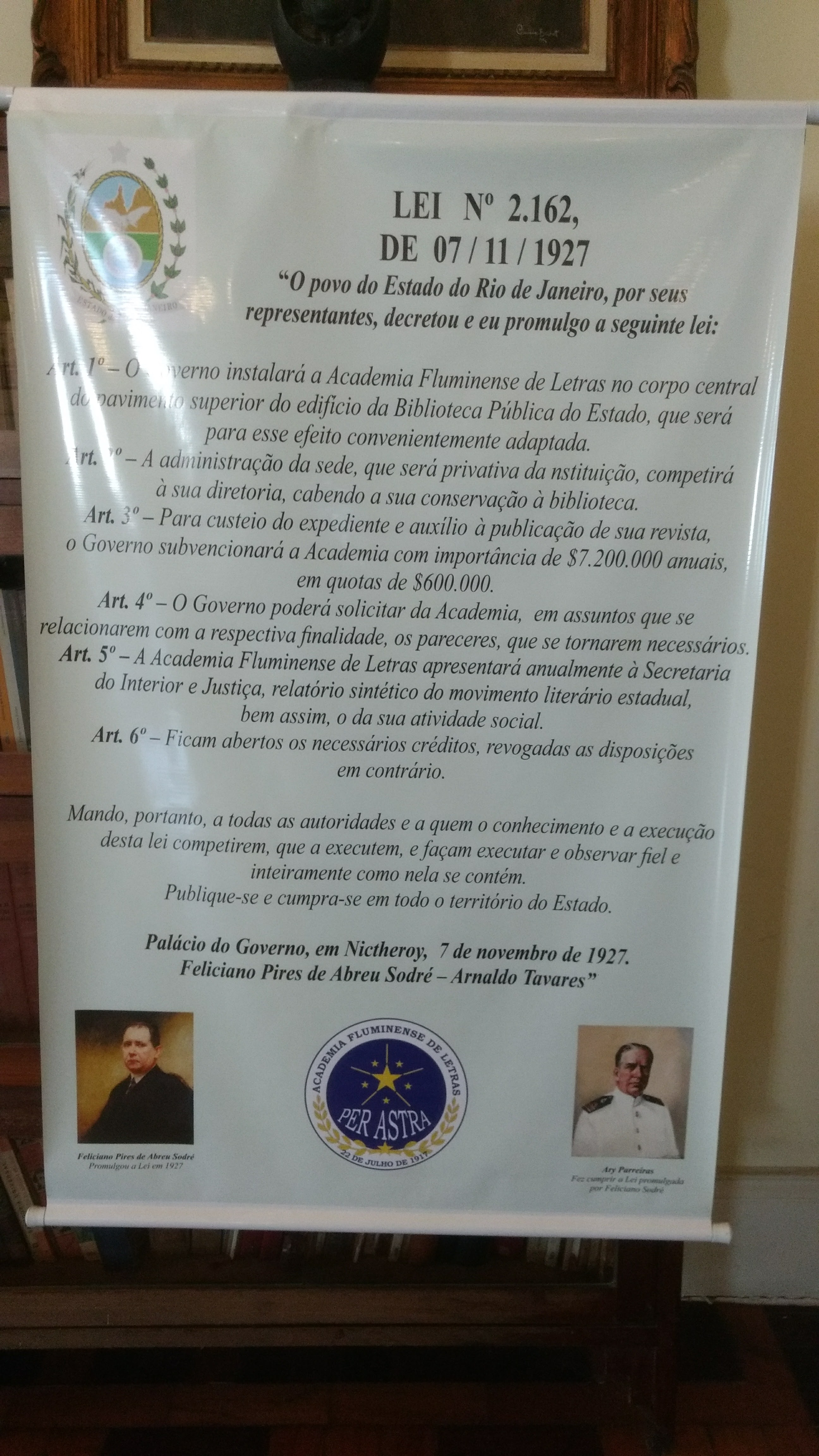 Banner com a Lei